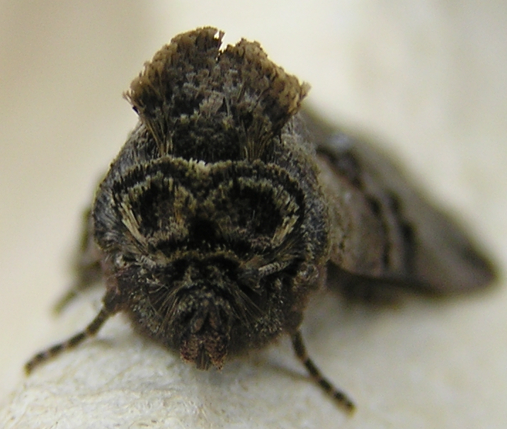 "Spectacles" of Abrostola tripartita close-up